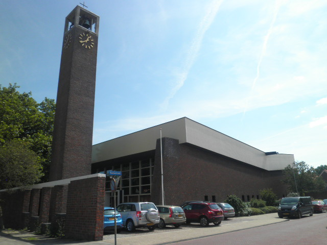 Kerk ontworpen door Oudejans & Alberts, voltooid in 1962. Julianaweg 72